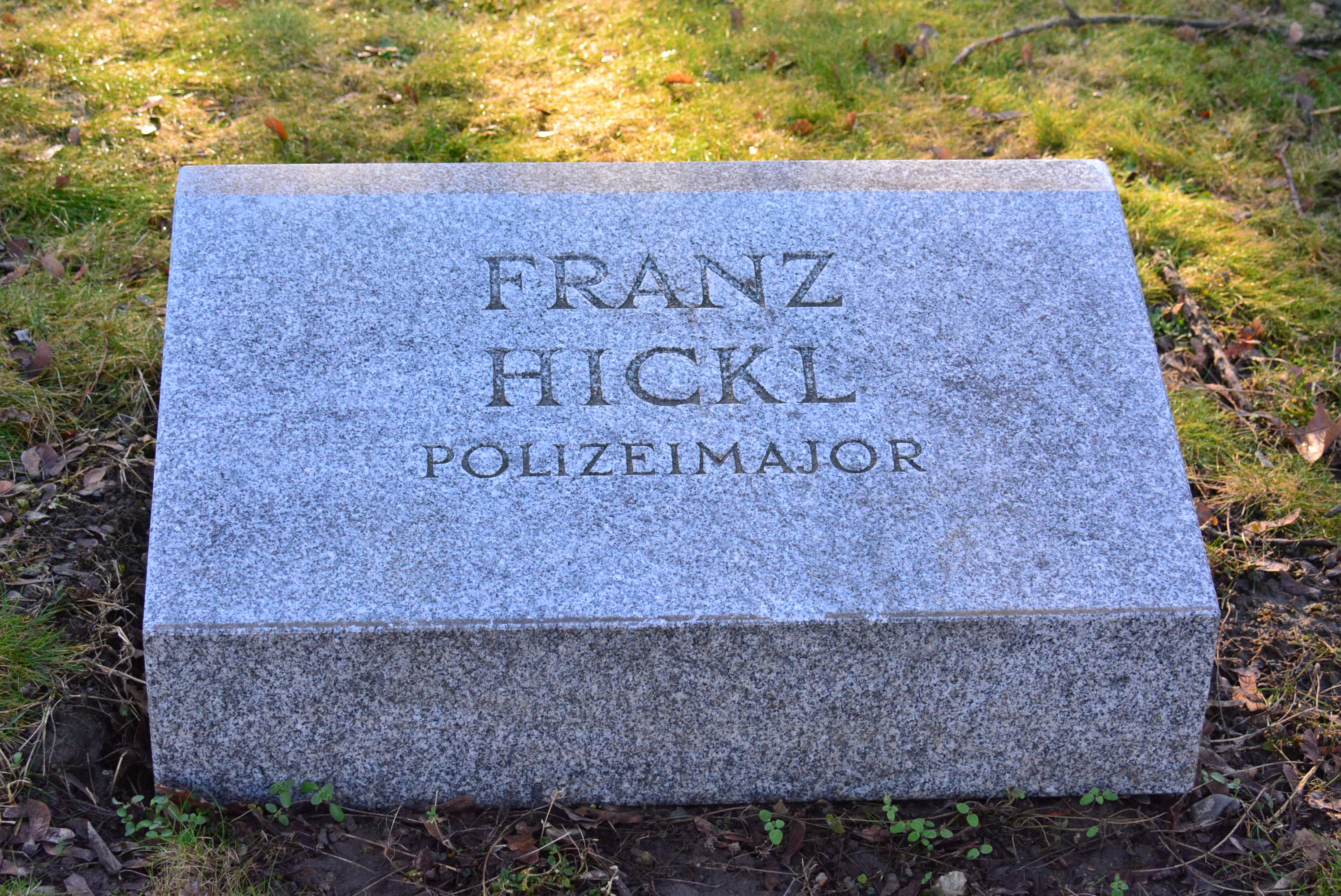 Grabanlage für Opfer des Bürgerkriegs 1934 auf Seiten der Exekutive auf dem Wiener Zentralfriedhof. Franz Hickl war Polizeikommandant in Innsbruck und wurde während des Juliputsches 1934 durch den Nationalsozialisten Friedrich Wurnig (* 1908) ermordet. Wurnig wurde dafür zum Tode verurteilt und am 1. August 1934 im "kleinen Hof" des Innsbrucker Gefangenenhauses am Würgegalgen hingerichtet.